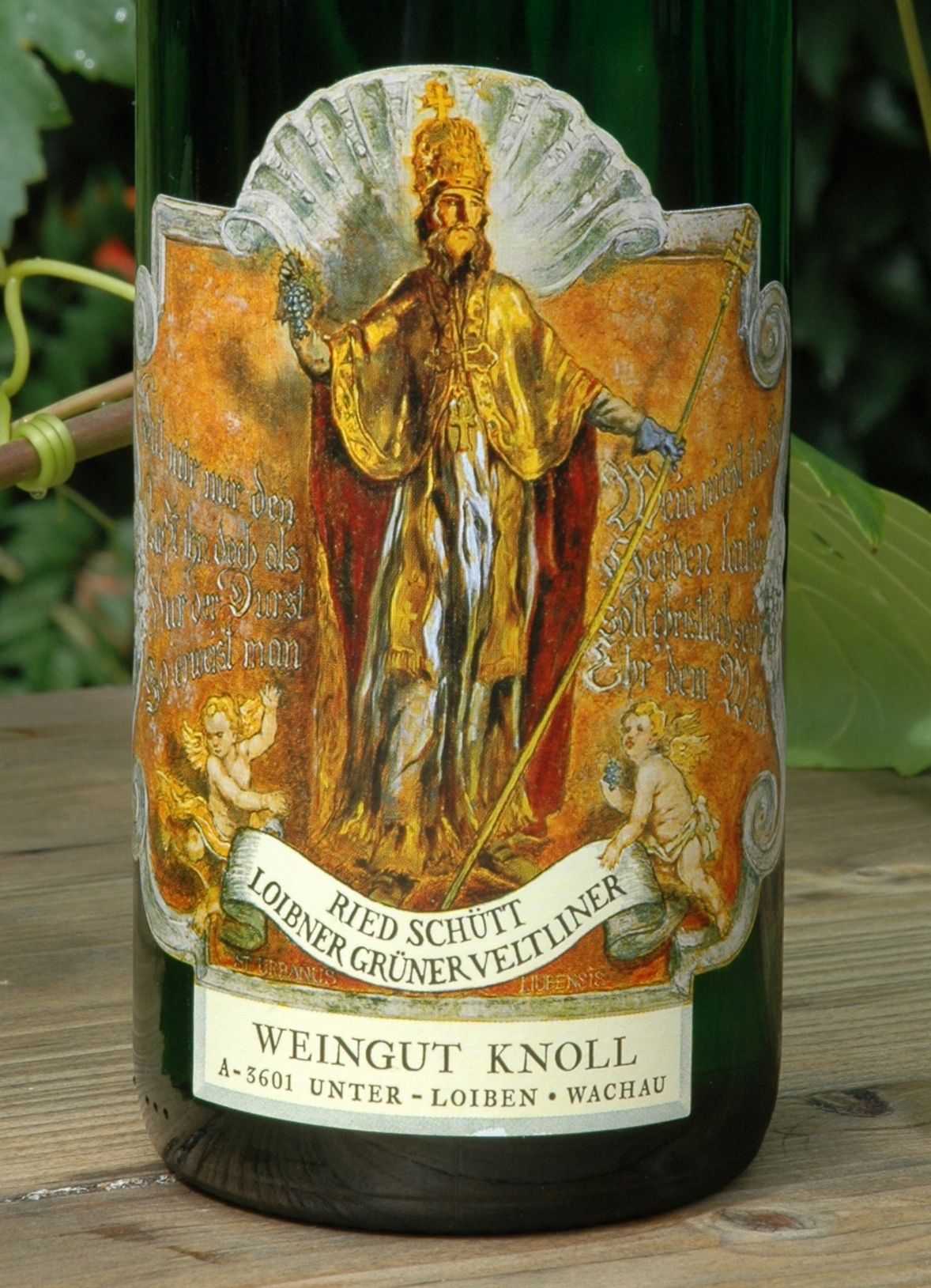 Etikett des Weingutes Emmerich Knoll, Unterloiben/Dürnstein Wachau, Österreich